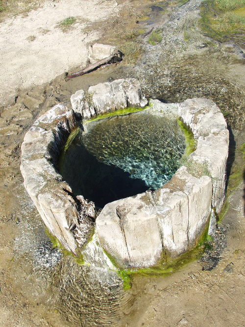 Один из символов города Соликамск